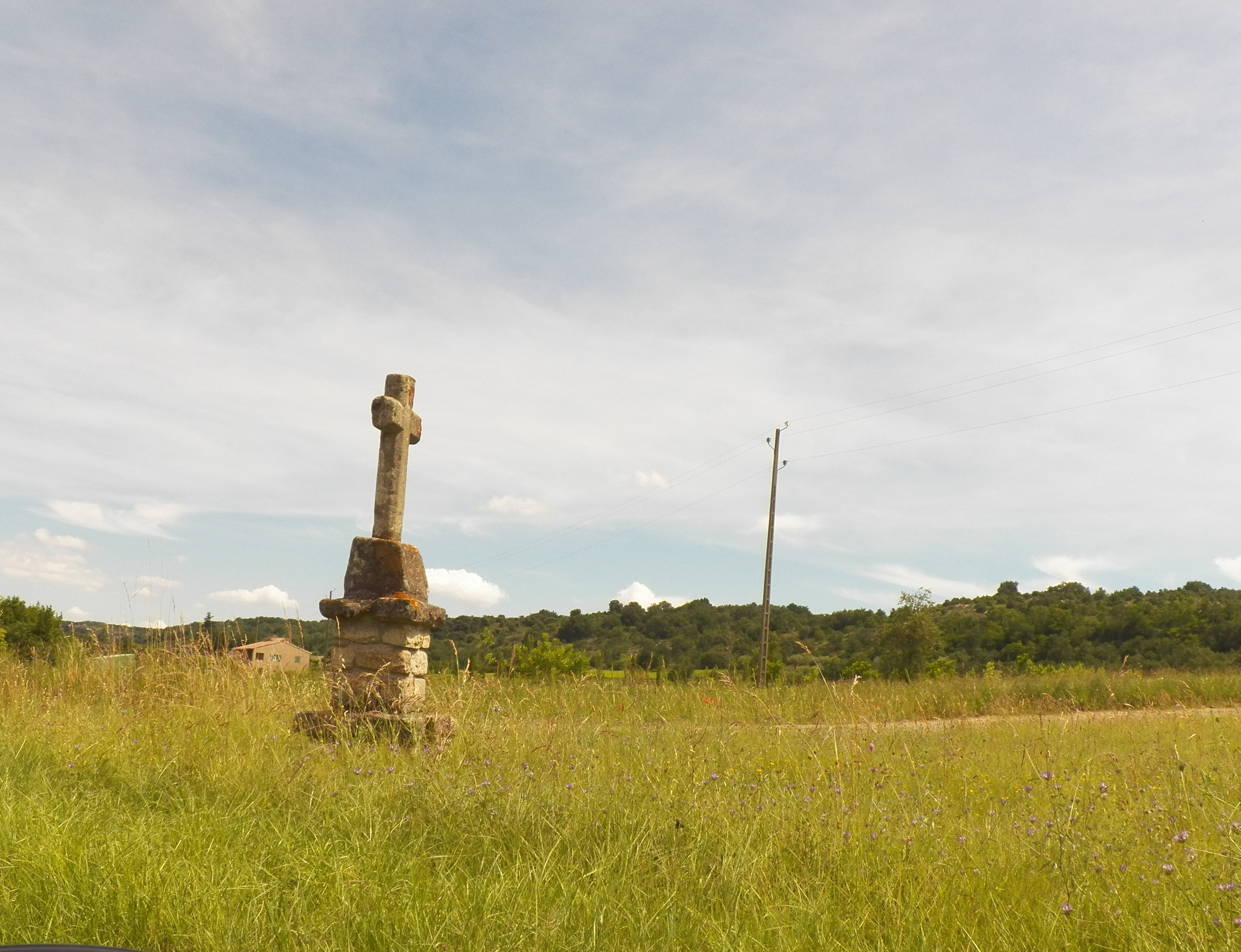 Groix de Mission dans la plaine de Jalès